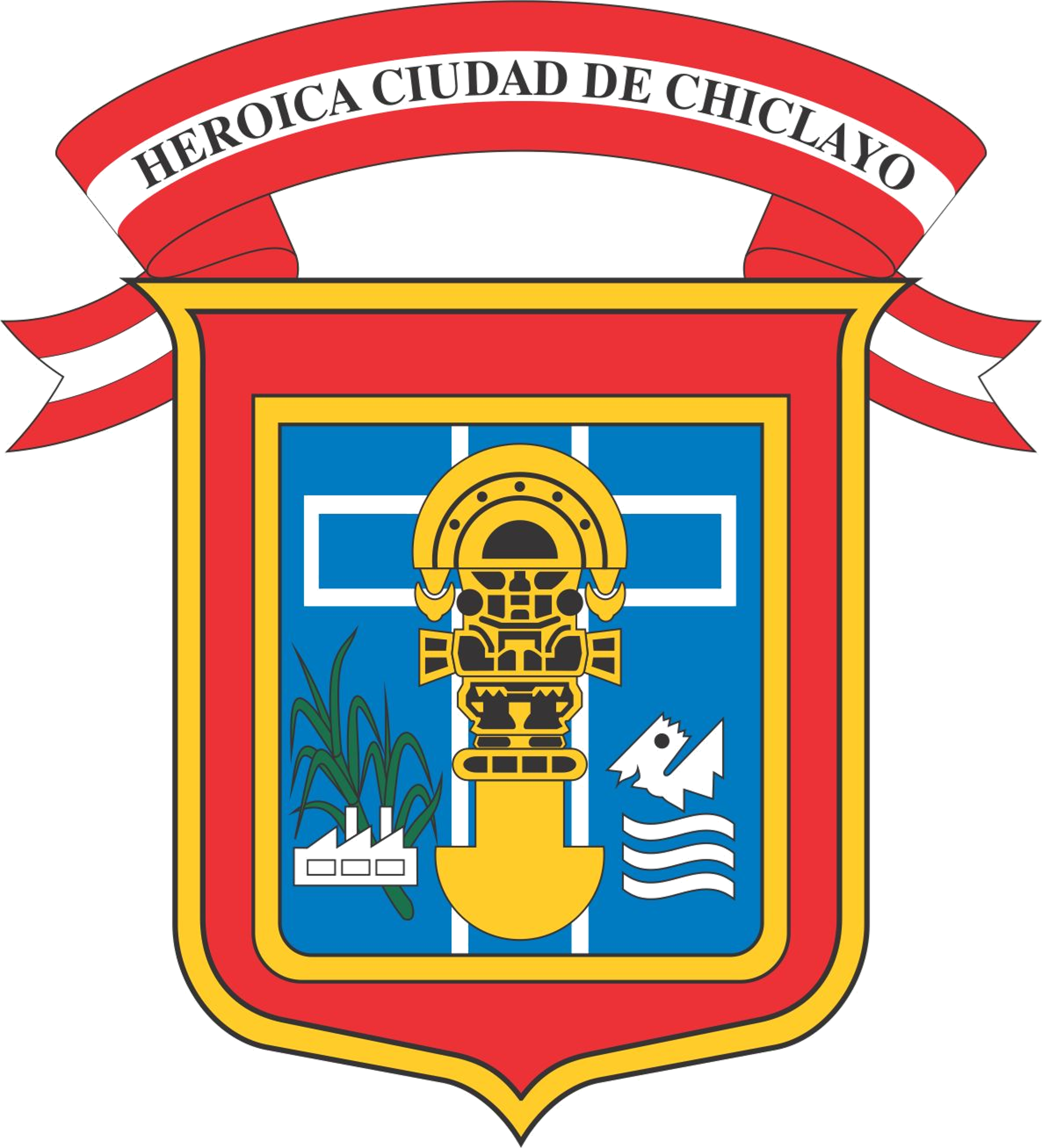 Escudo de la ciudad de Chiclayo, capital del departamento de Lambayeque